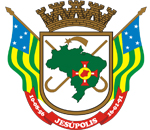 Brasão de Jesúpolis, Goiás, Brasil.